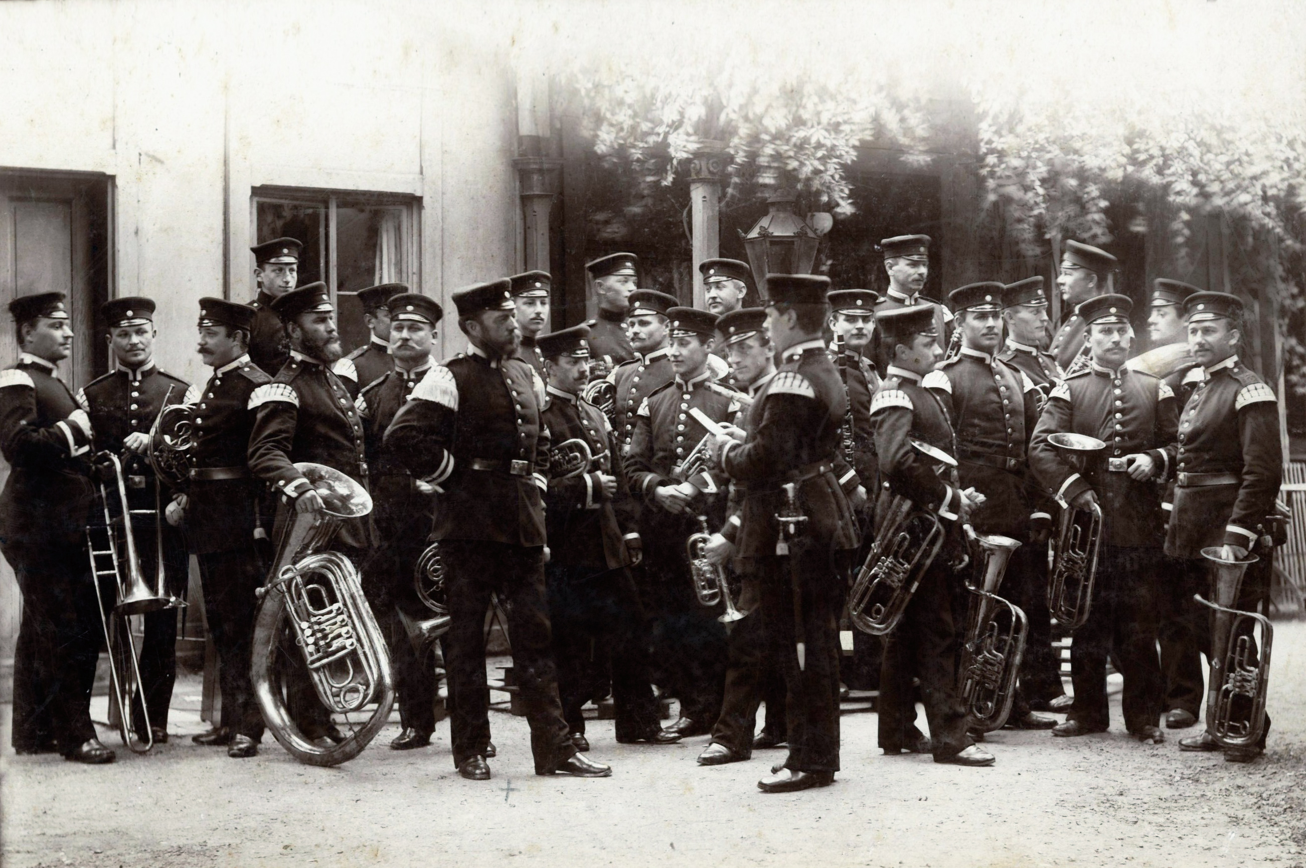 Heinrich Christoph Röpenack mit dem 2. Königlich Sächsischen Jägerbataillon Nr.13